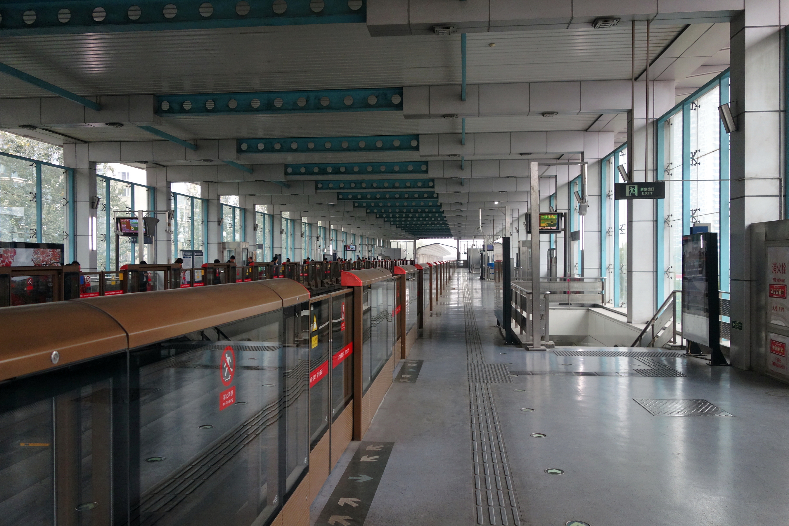 北京地铁5号线天通苑站侧式站台